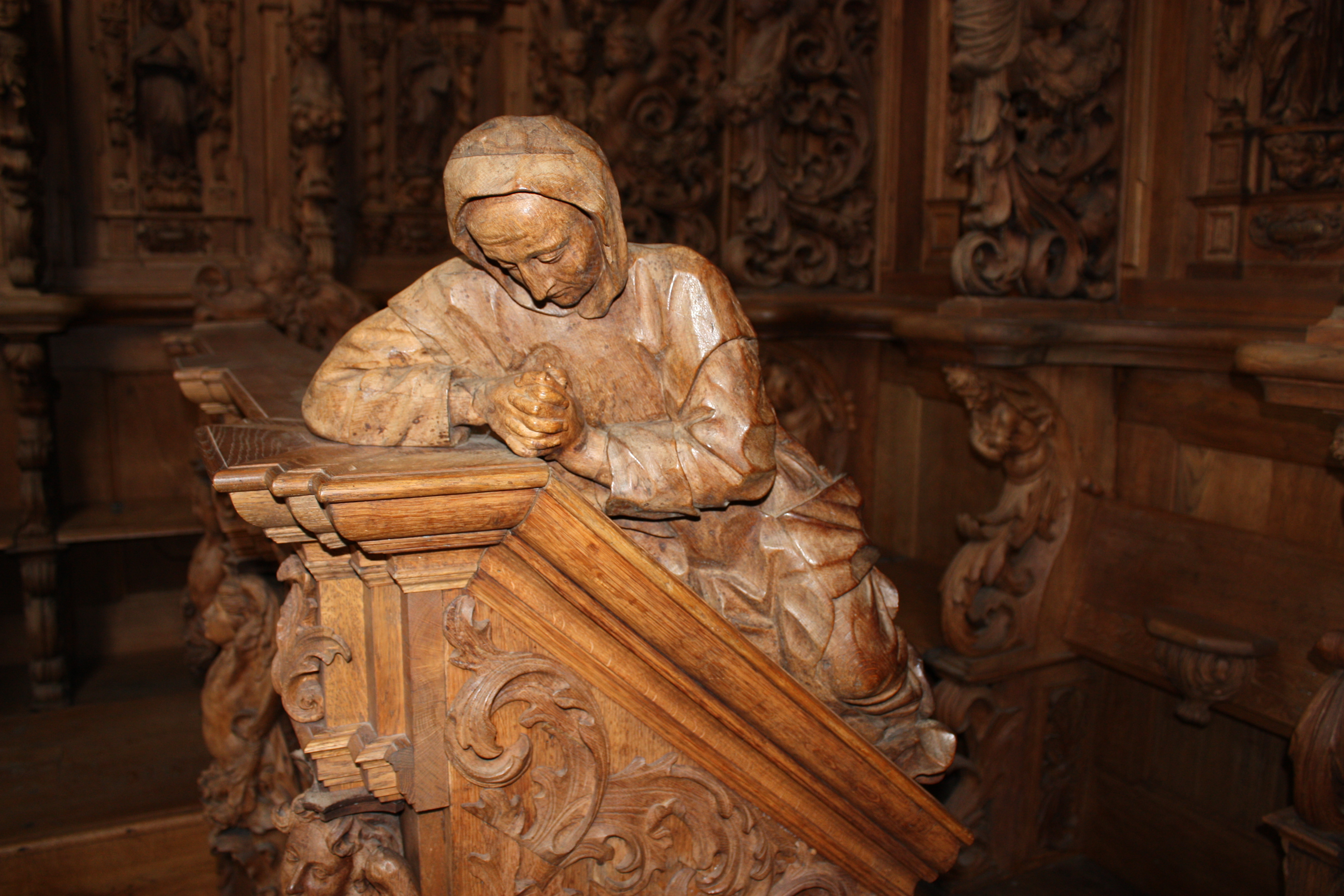 Chorgestühl in der ehemaligen Klosterkirche der Kartause in Buxheim bei Memmingen